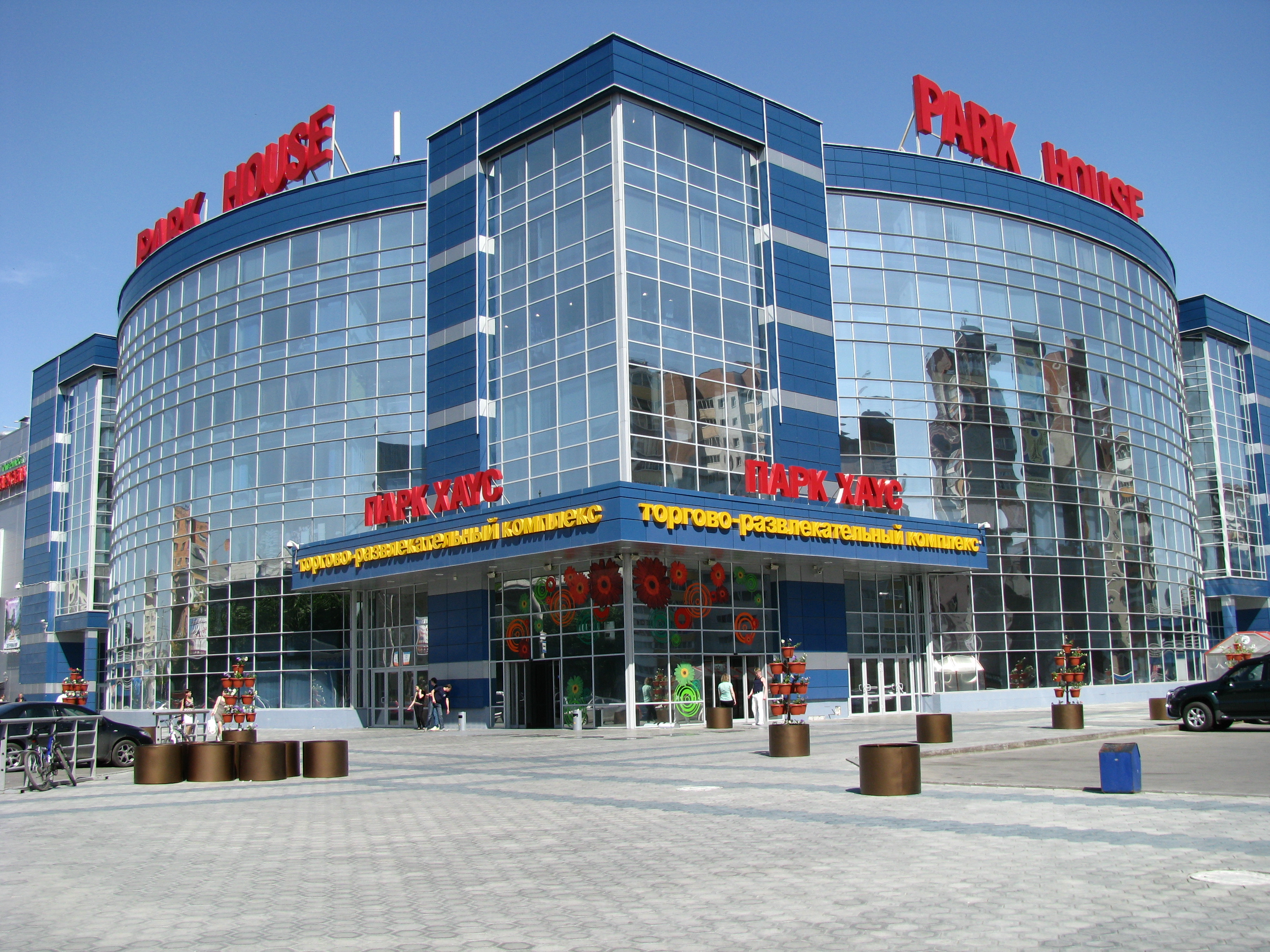 п